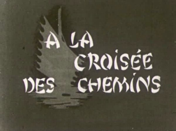 Image du générique du film À la croisée des chemins